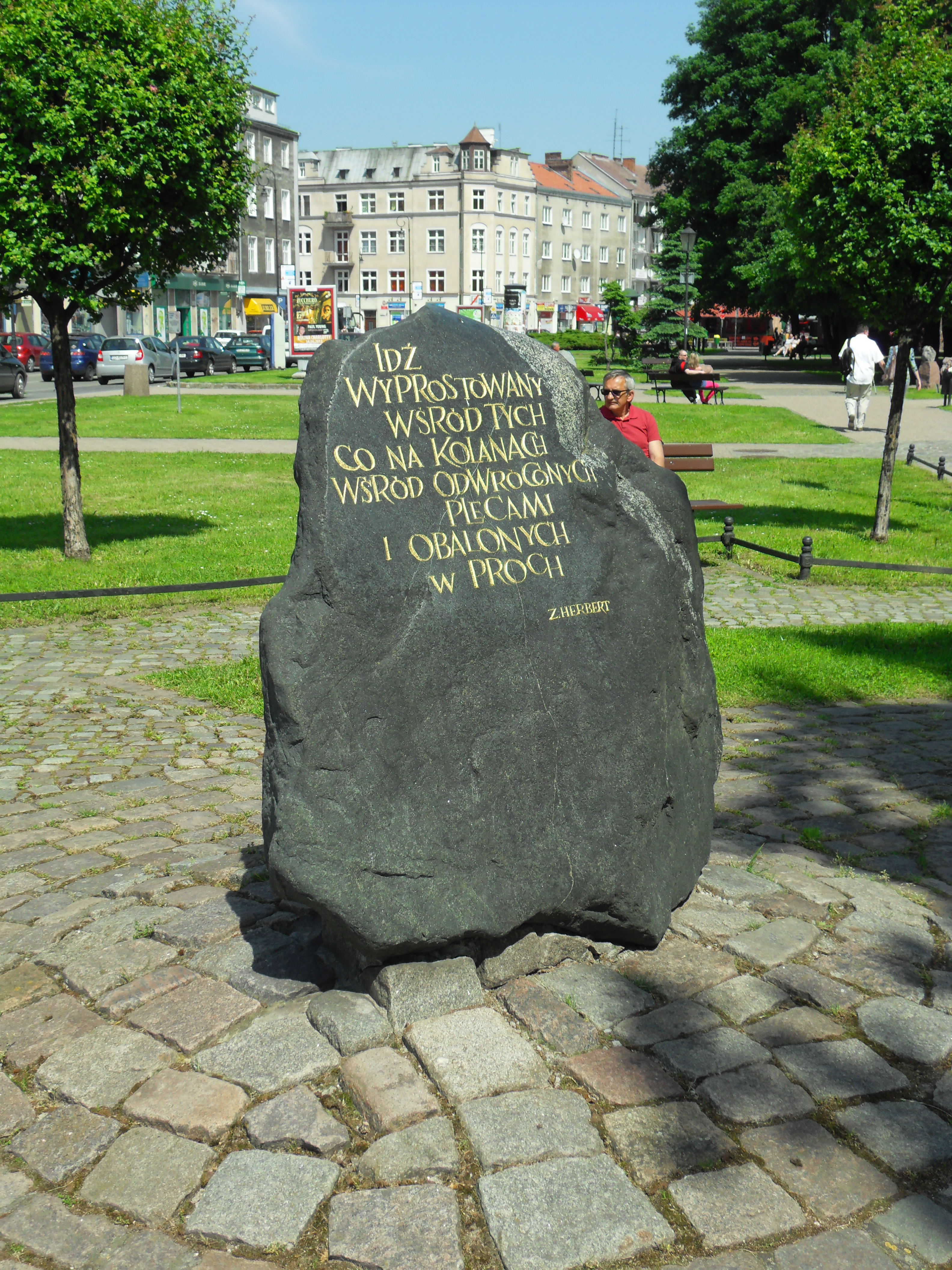 Gdańsk Główne Miasto. Pomnik Dariusza Kobzdeja (autor: Sławoj Ostrowski, cytat: Zbigniew Herbert), pl. Kobzdeja.